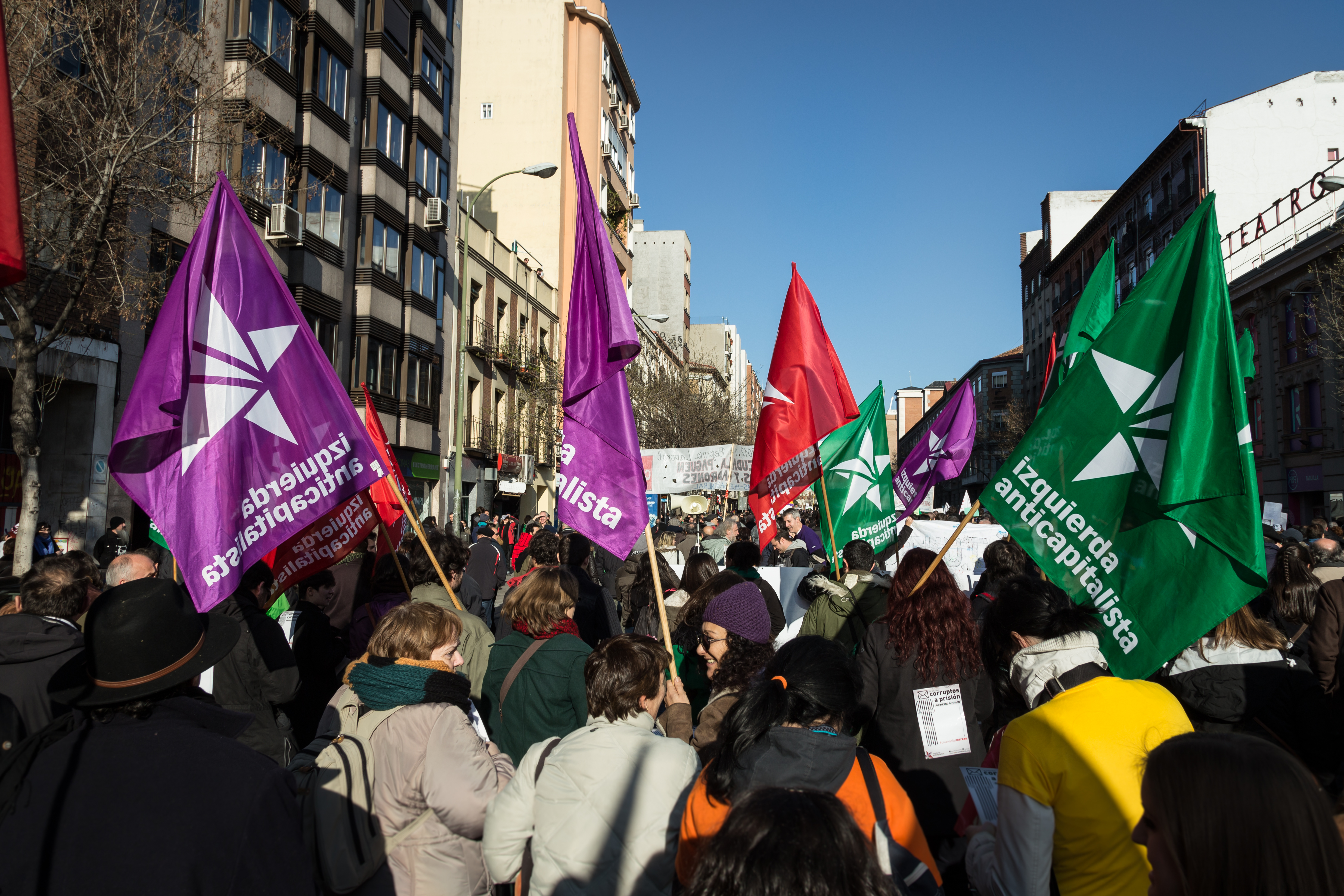 Manifestación "Marea Ciudadana" en su recorrido entre Embajadores y Atocha, Madrid.